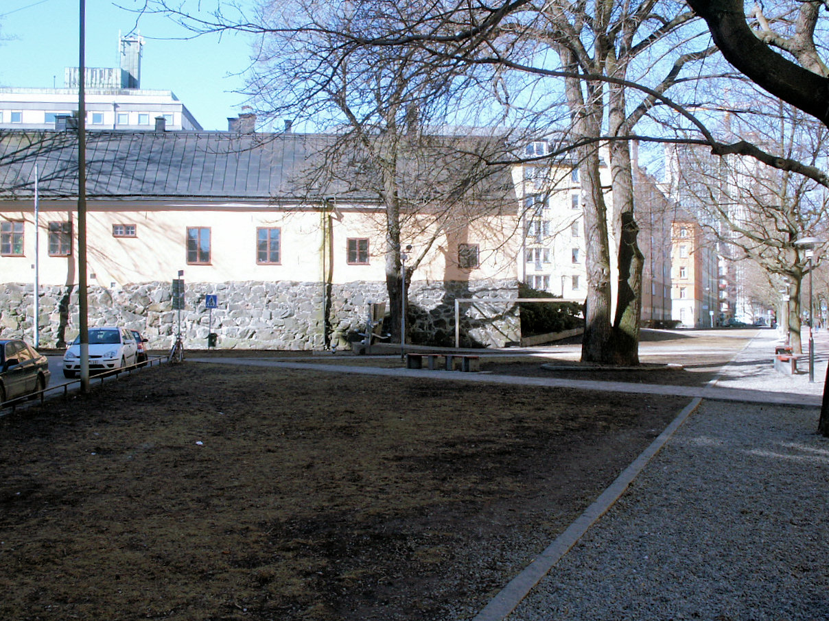 Nackas Hörna, Stockholm, Sweden.